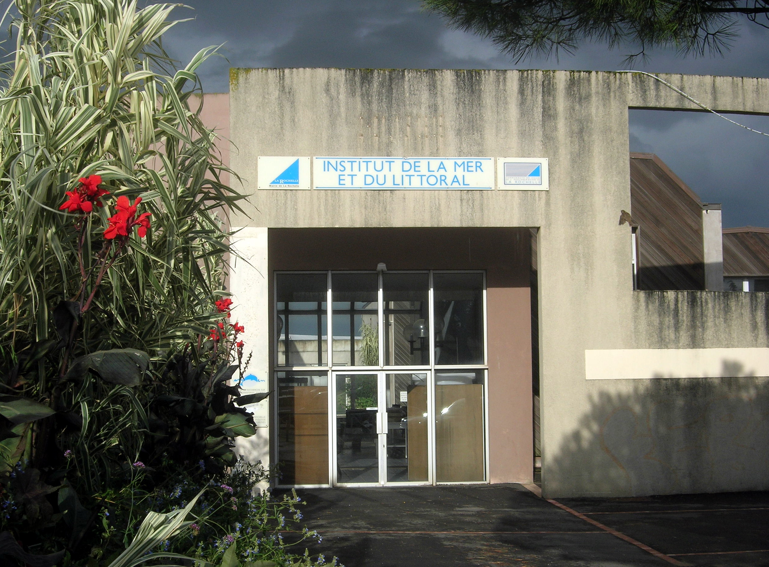 Description = Institut de la mer et du littoral à La Rochelle Source =Photo taken by Remi Jouan Date =Septembre 2006 Author =Remi Jouan